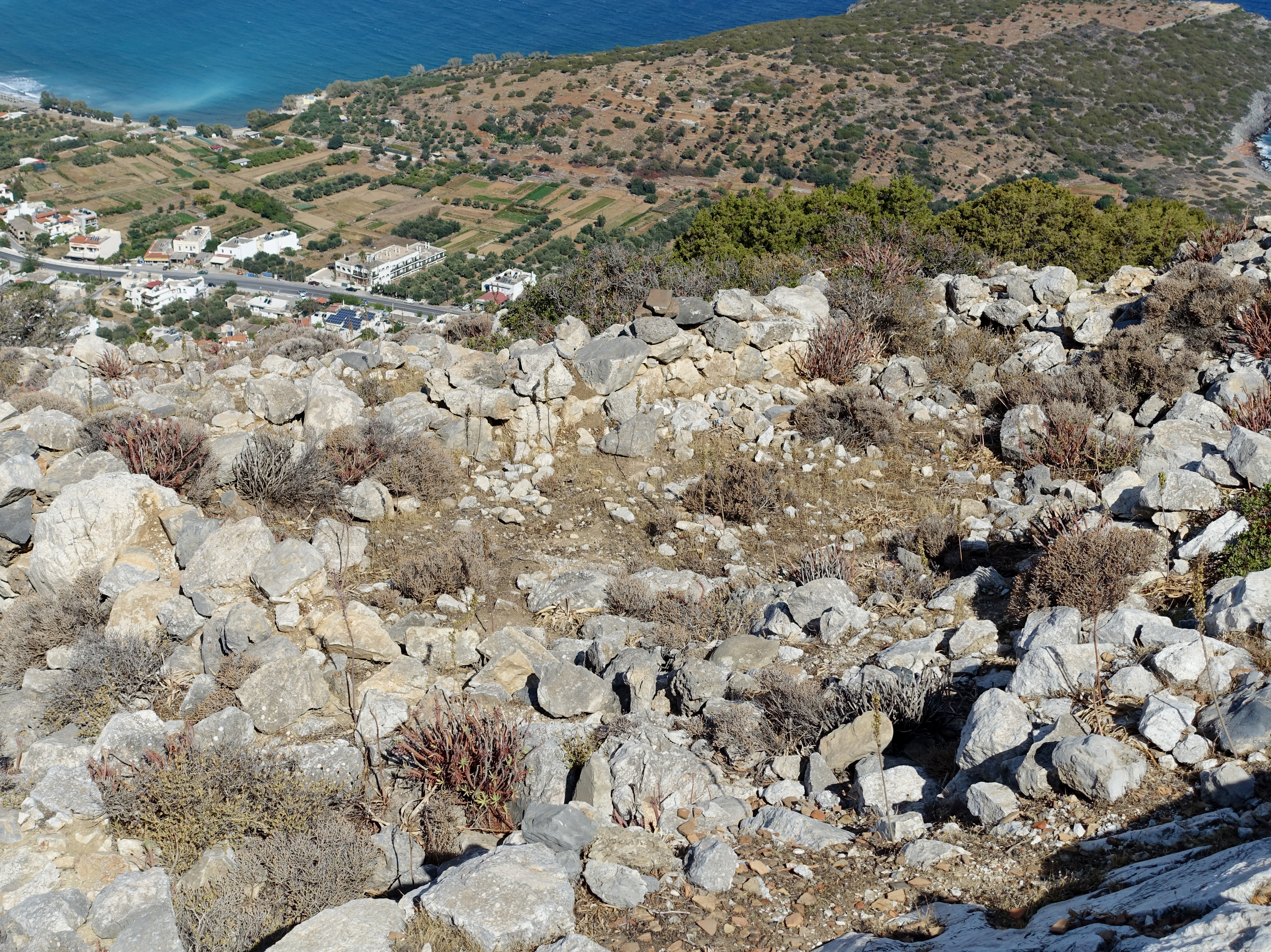 Ausgrabungsstätte von Vrokastro (Βρόκαστρο) bei Istro, Gemeinde Agios Nikolaos, Kreta, Griechenland